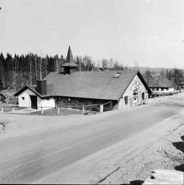 Kyrkan mot sydväst. Kategori: (01) ExteriörerKyrkan mot sydväst.